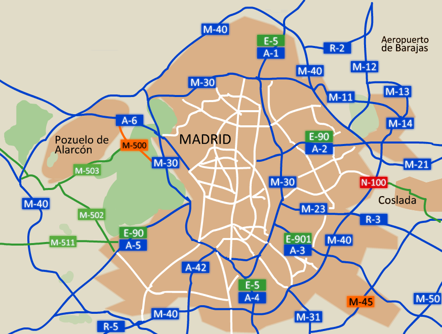 mapa de las autovías deMadrid